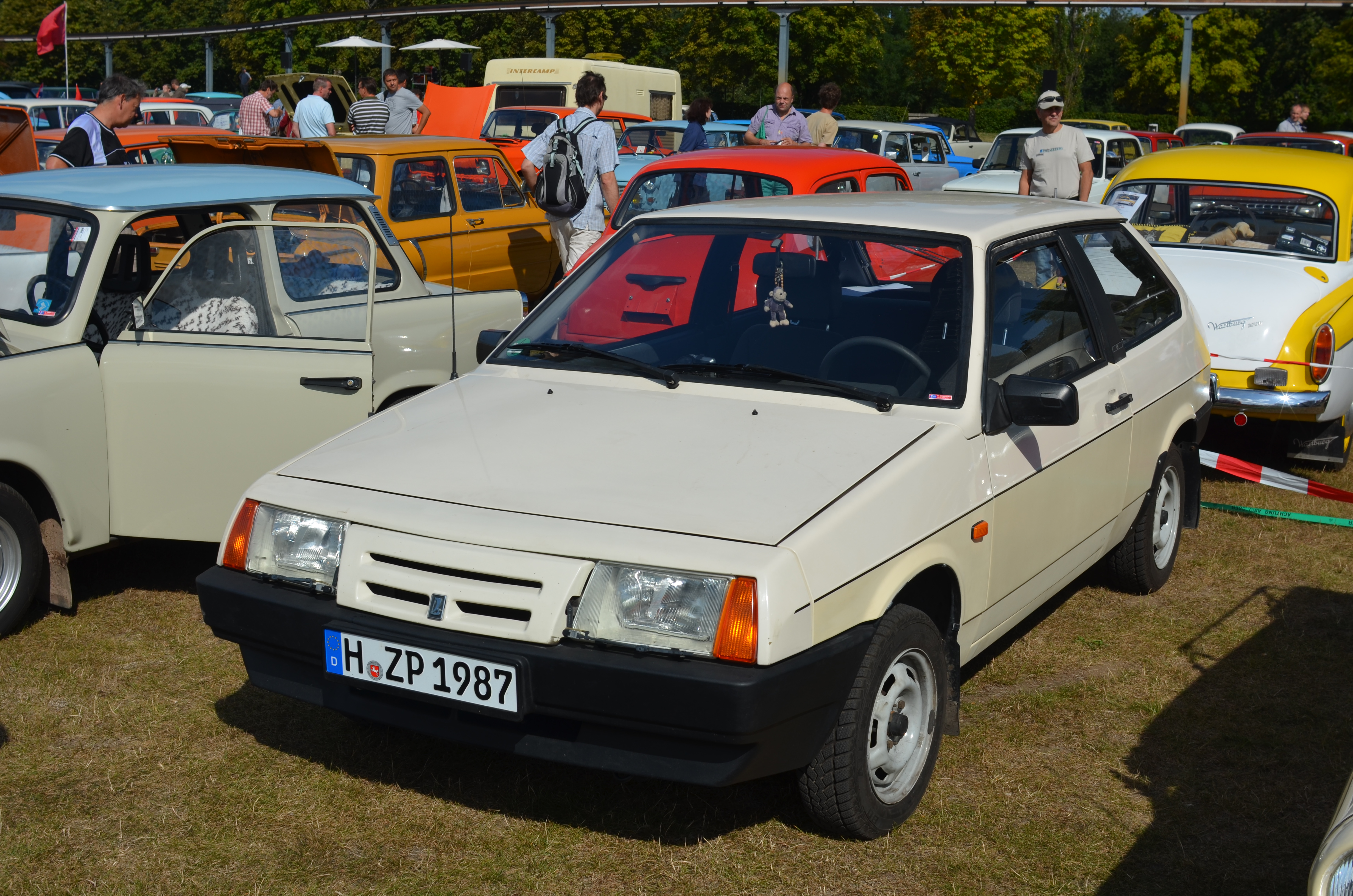 Lada